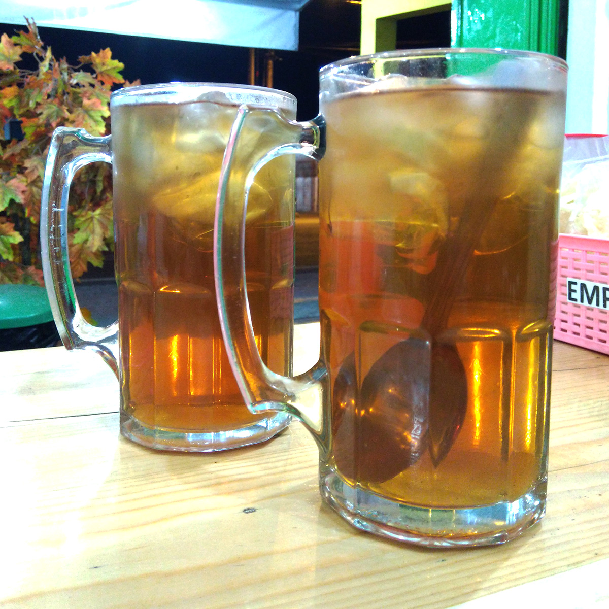 Es teh gelas jumbo